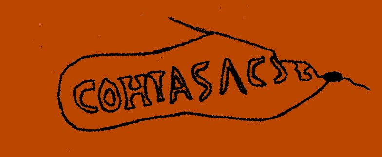 Röm. Ziegelstempel in Form einer Sohle, Inschrift: COH I AELIA SAGITTARIORUM, Stift Klosterneuburg, Kreuzgarten, 2,95 cm/Stempel 222-235 Jhdt. n.Chr. Quelle: Hannsjörg Ubl: I. Das Römische Lapidarium, Stiftsmuseum Klosterneuburg 1991, S. 41